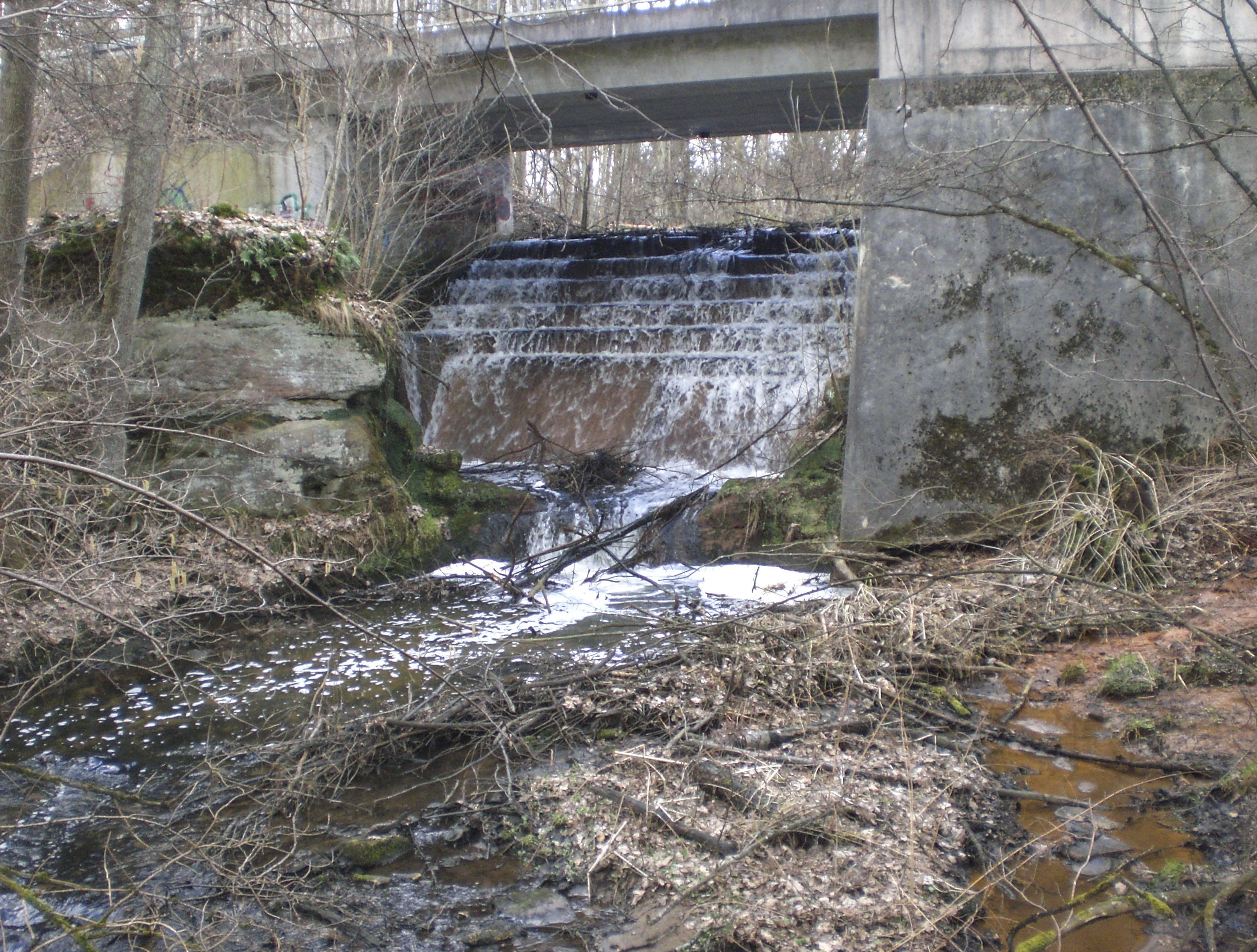 Wasserfall, Gauchsbach, Röthenbach bei Sankt Wolfgang